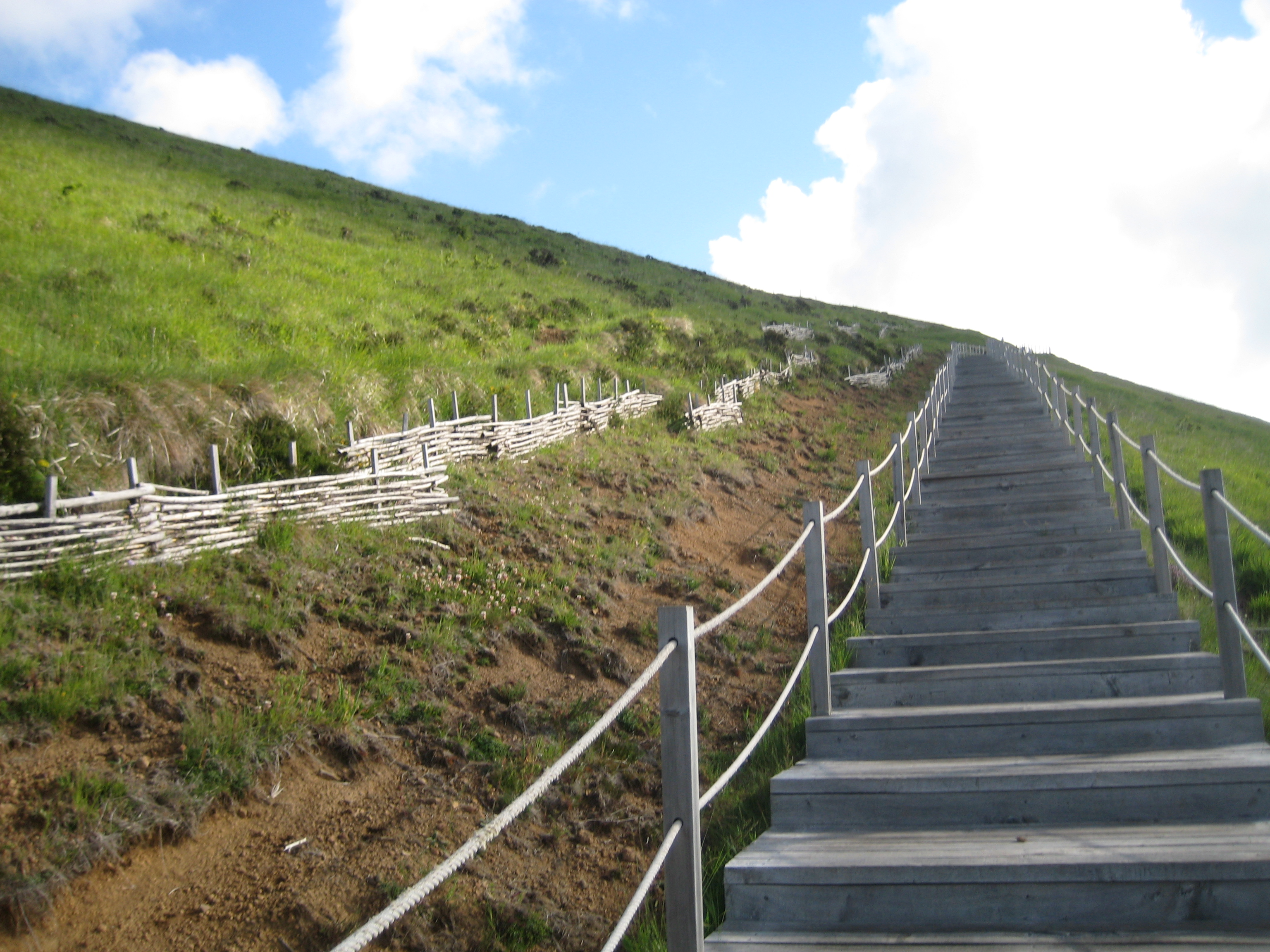 la montée aménagée du Puy de Pariou